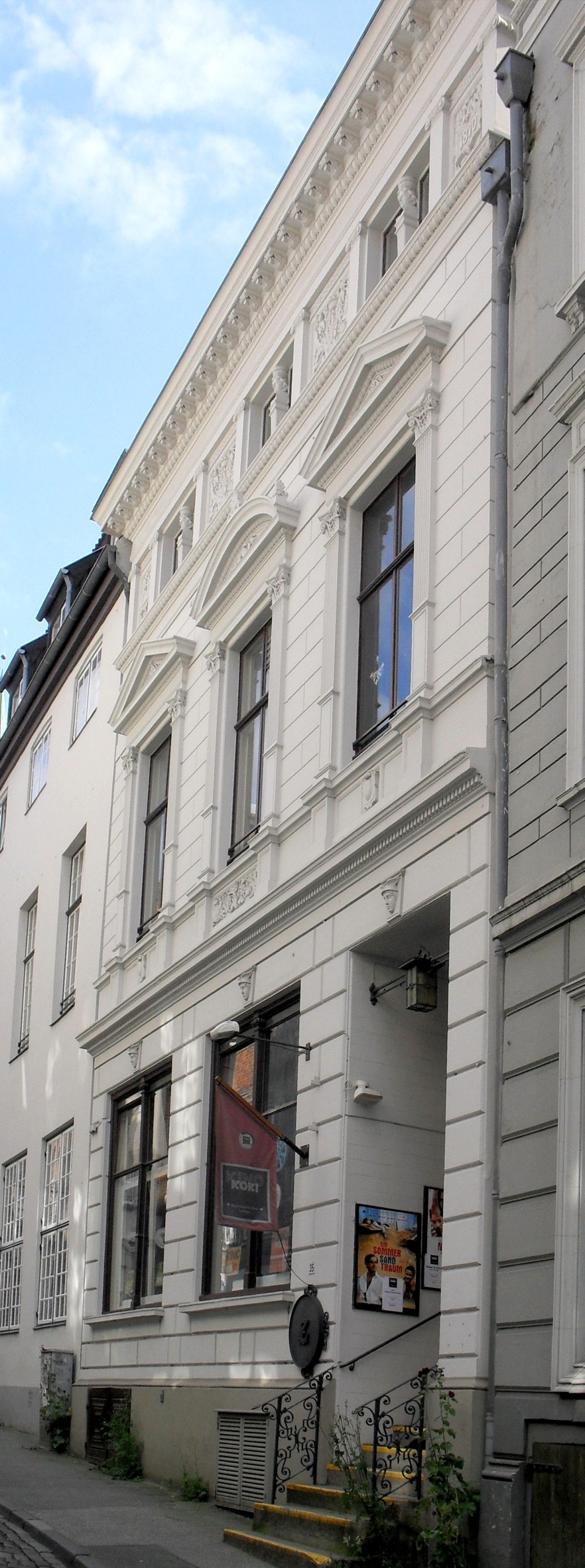 Kommunales Kino Lübeck, Mengstraße 35